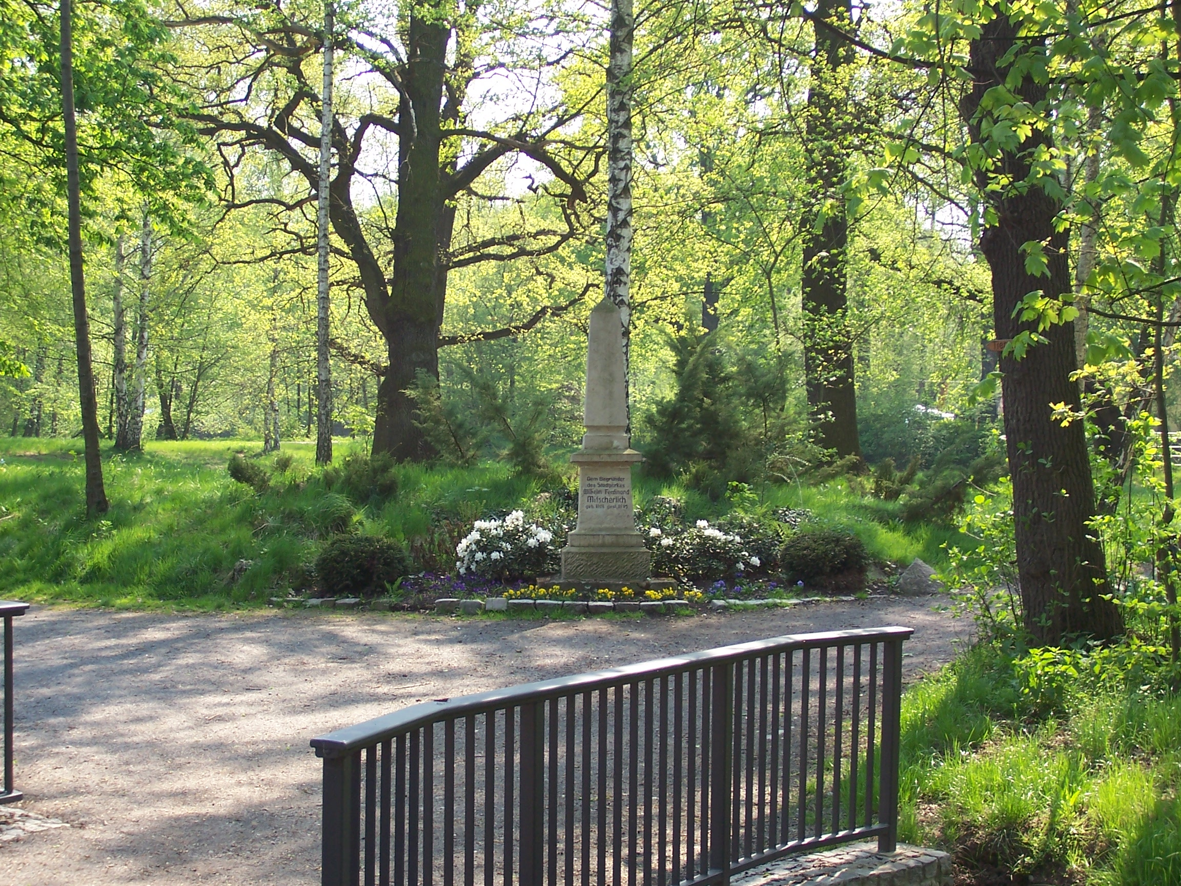 Stadtpark Eilenburg mit Mitscherlich-Denkmal